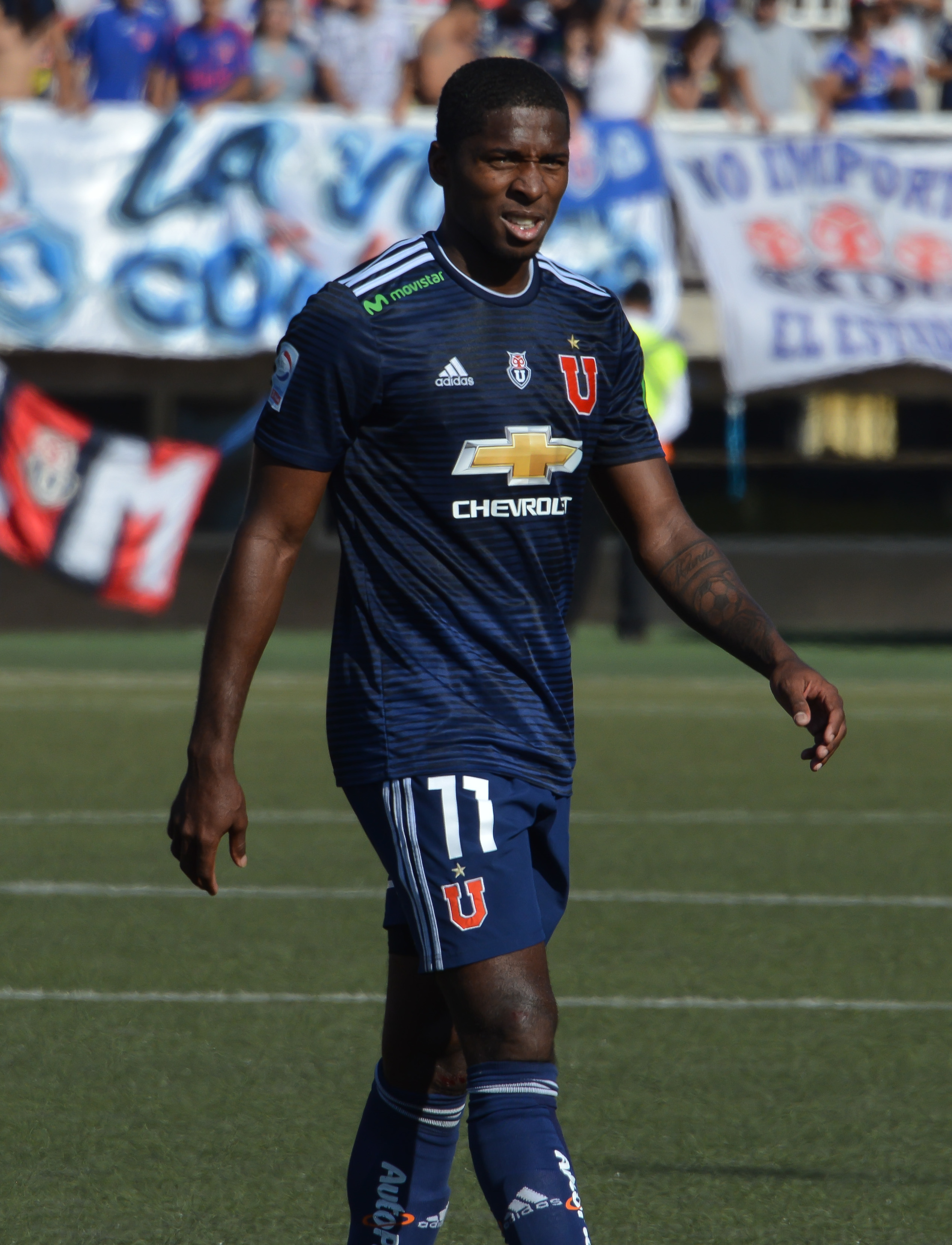 Unión La Calera v Universidad de Chile, Estadio Municipal Lucio Fariña Fernández, Quillota, Chile.